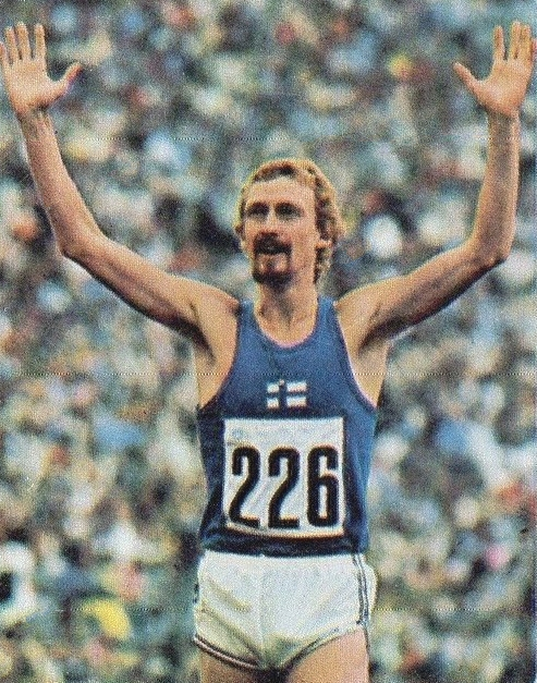 CAMPIONI dello SPORT 1973/74-Figurina n.15- VASALA-FINLANDIA-ATLETICA LEGG.-Rec